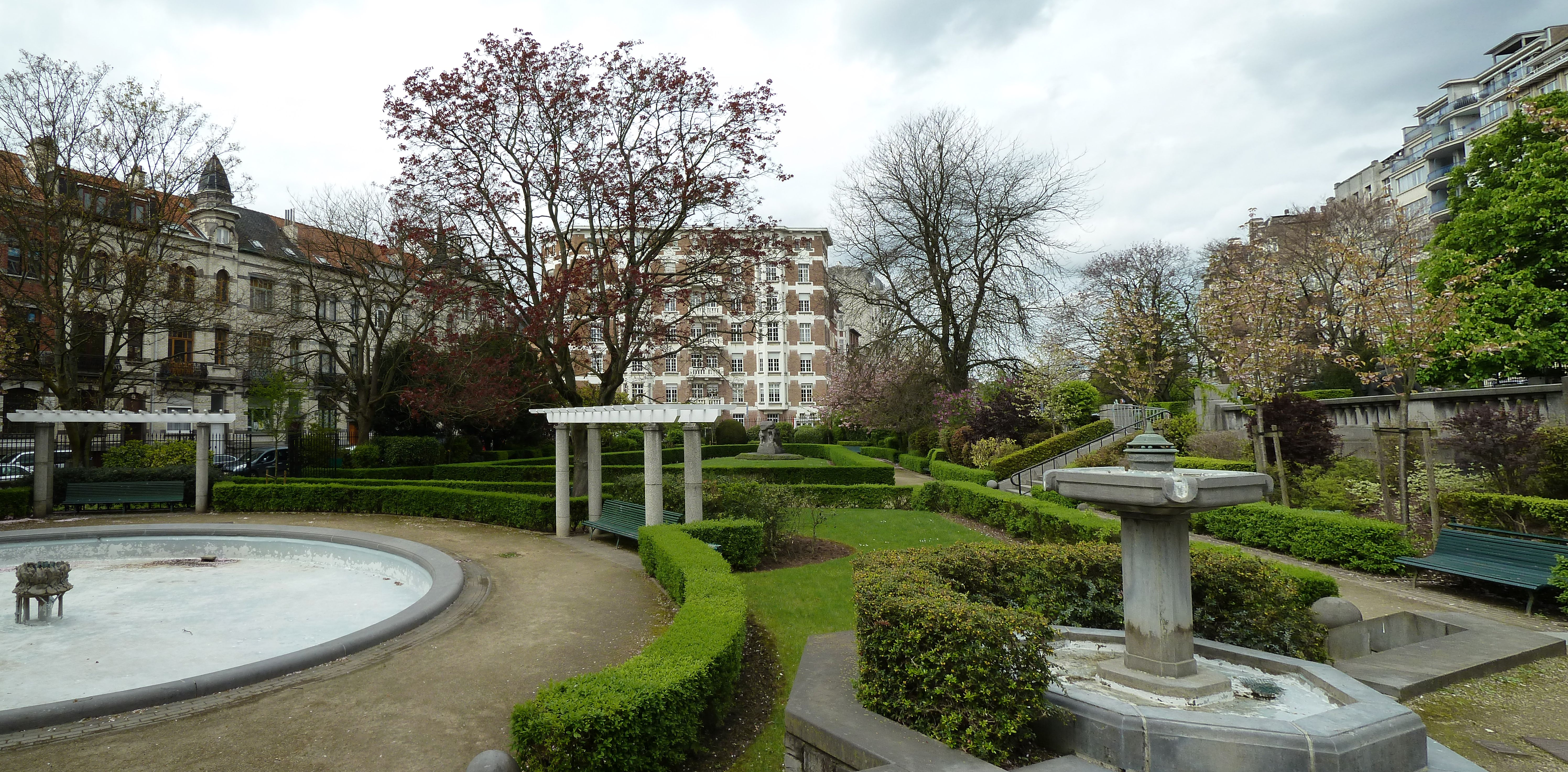 panorama monument charler